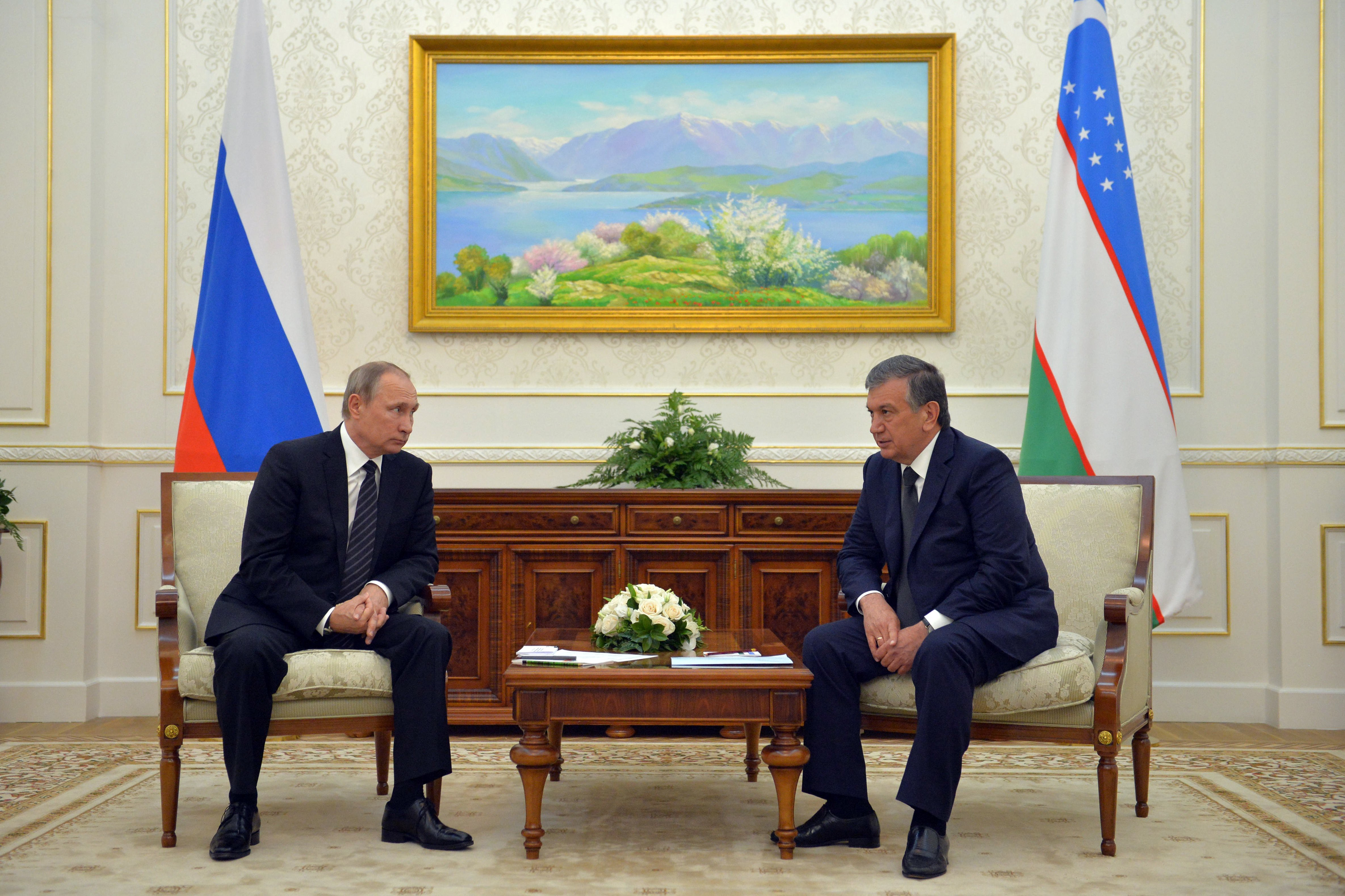 Президент России Владимир Путин с Премьер-министром Узбекистана Шавкатом Мирзиёевым